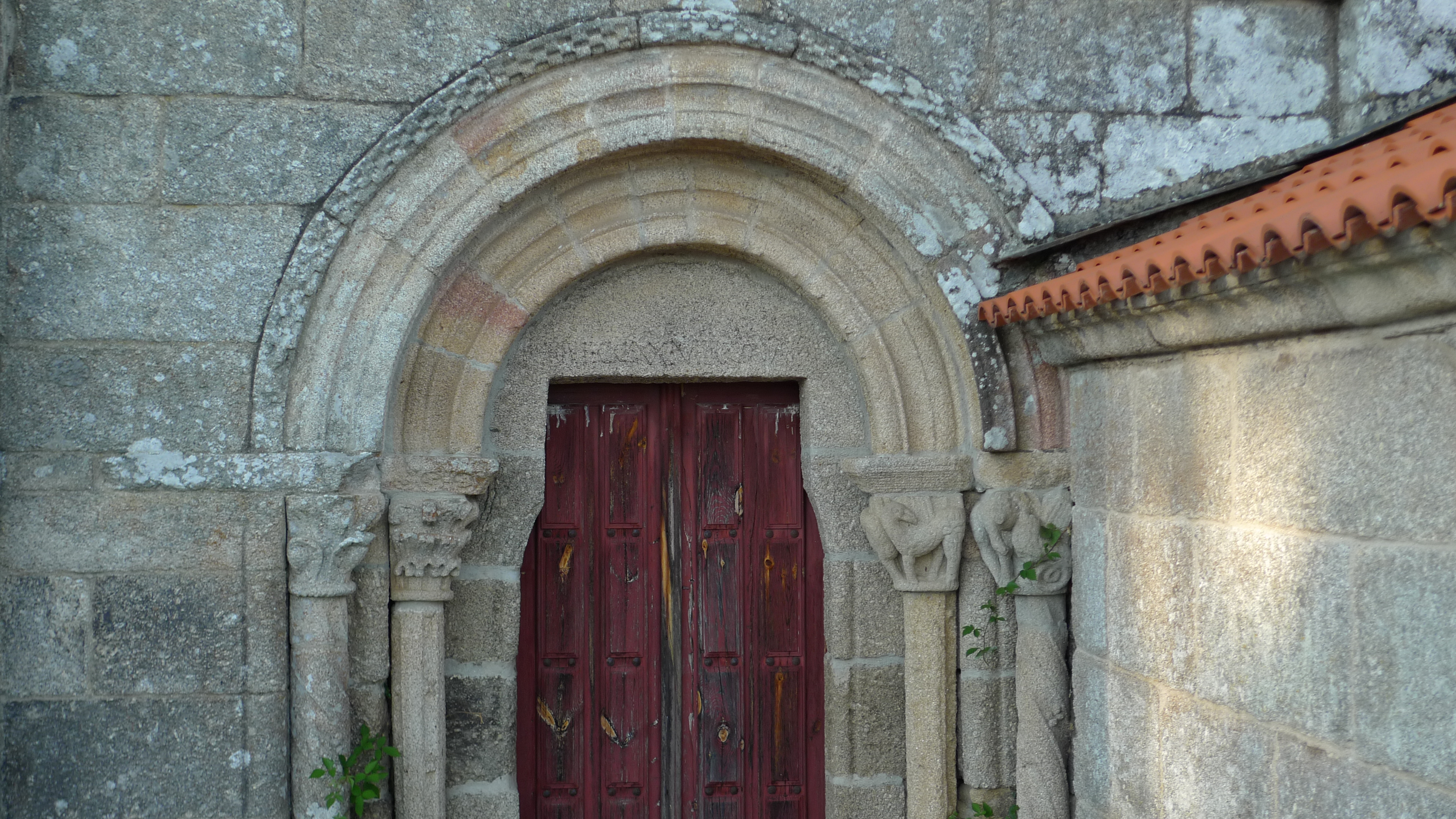 Igrexa de San Pedro de Bembibre - Taboada (Lugo)